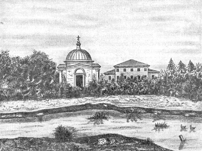 View from the house and the house church in Tarkhany, lithography M. Rudkevich 1842